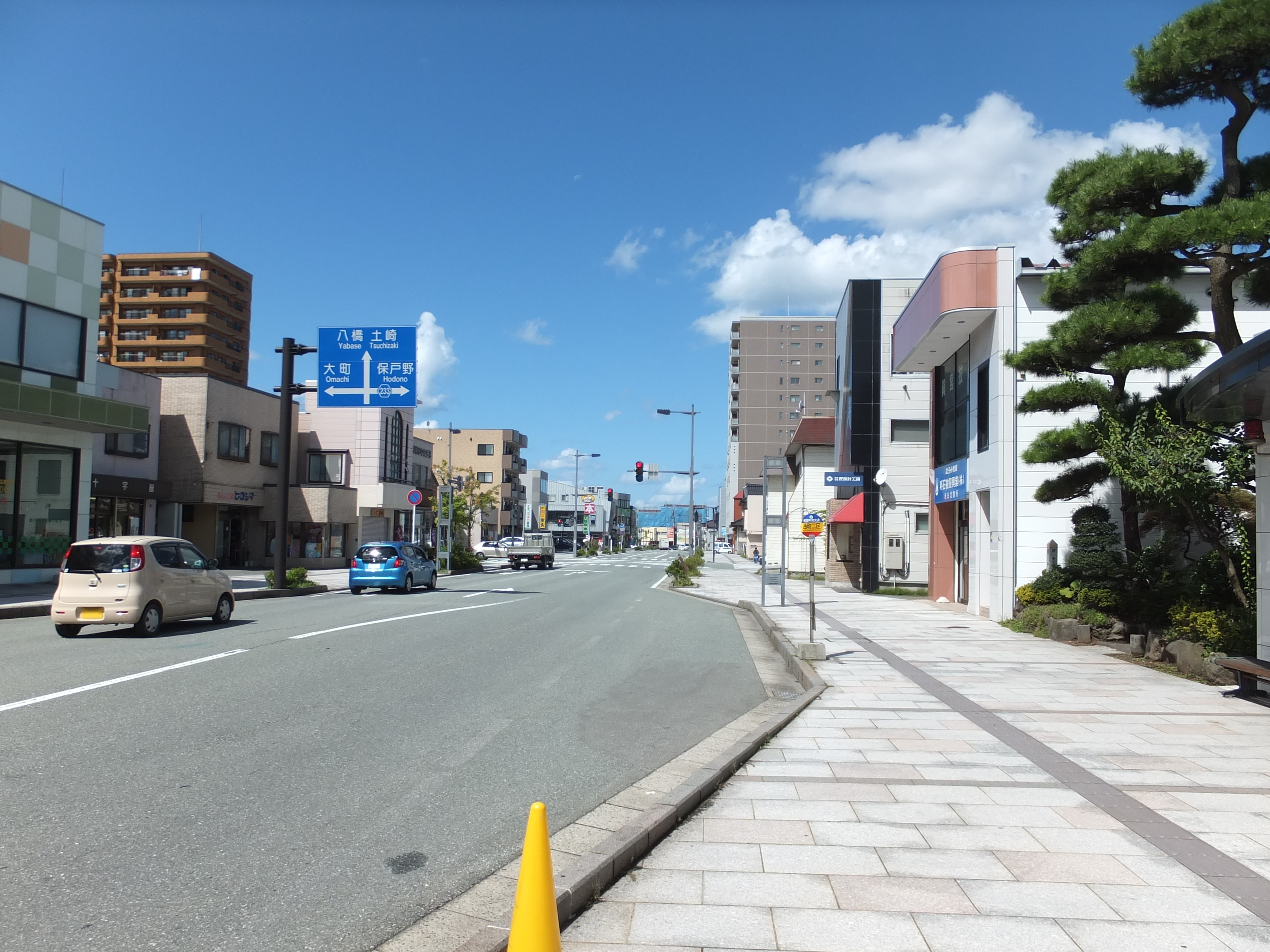 秋田市通町